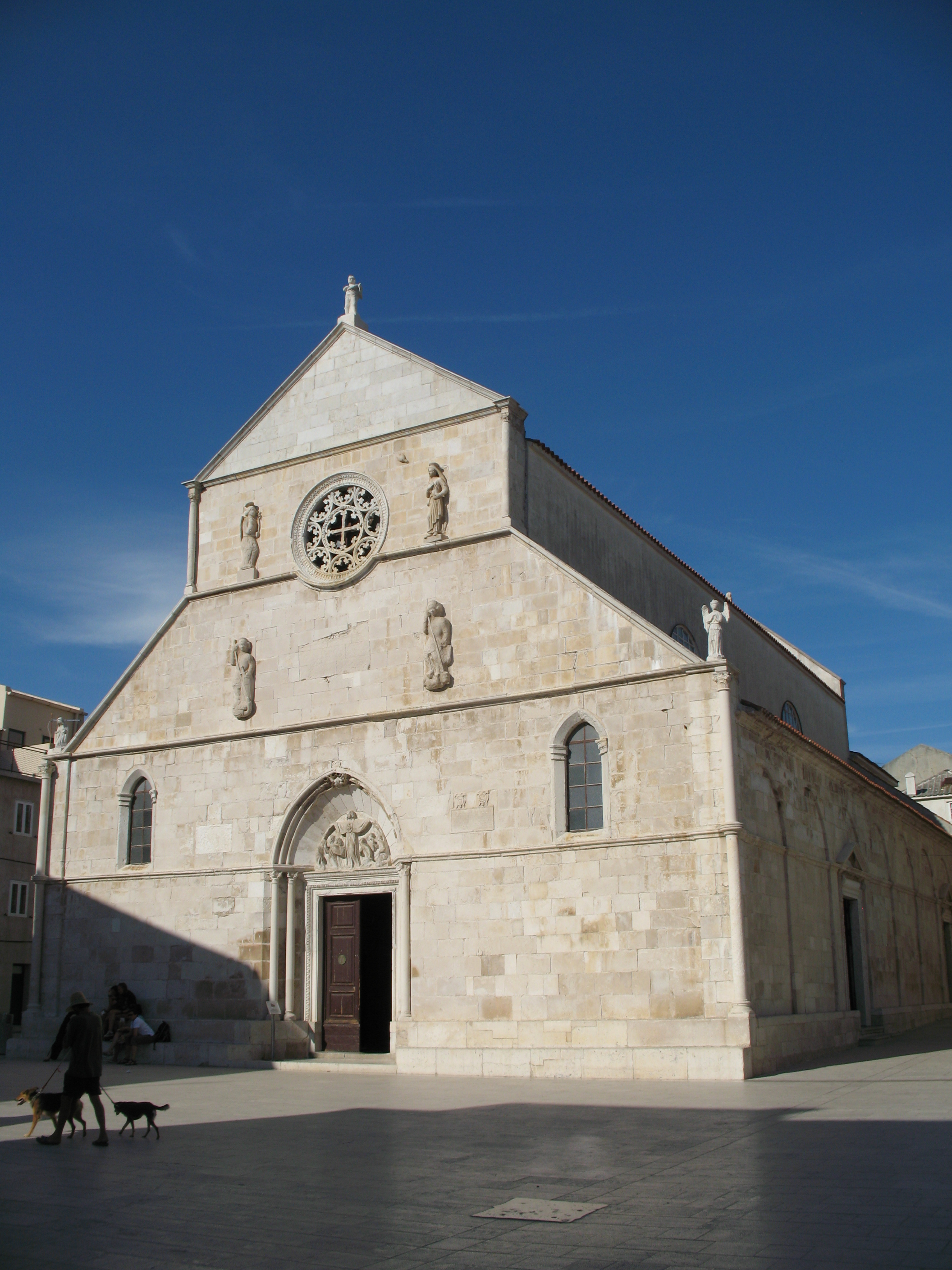 Pag város